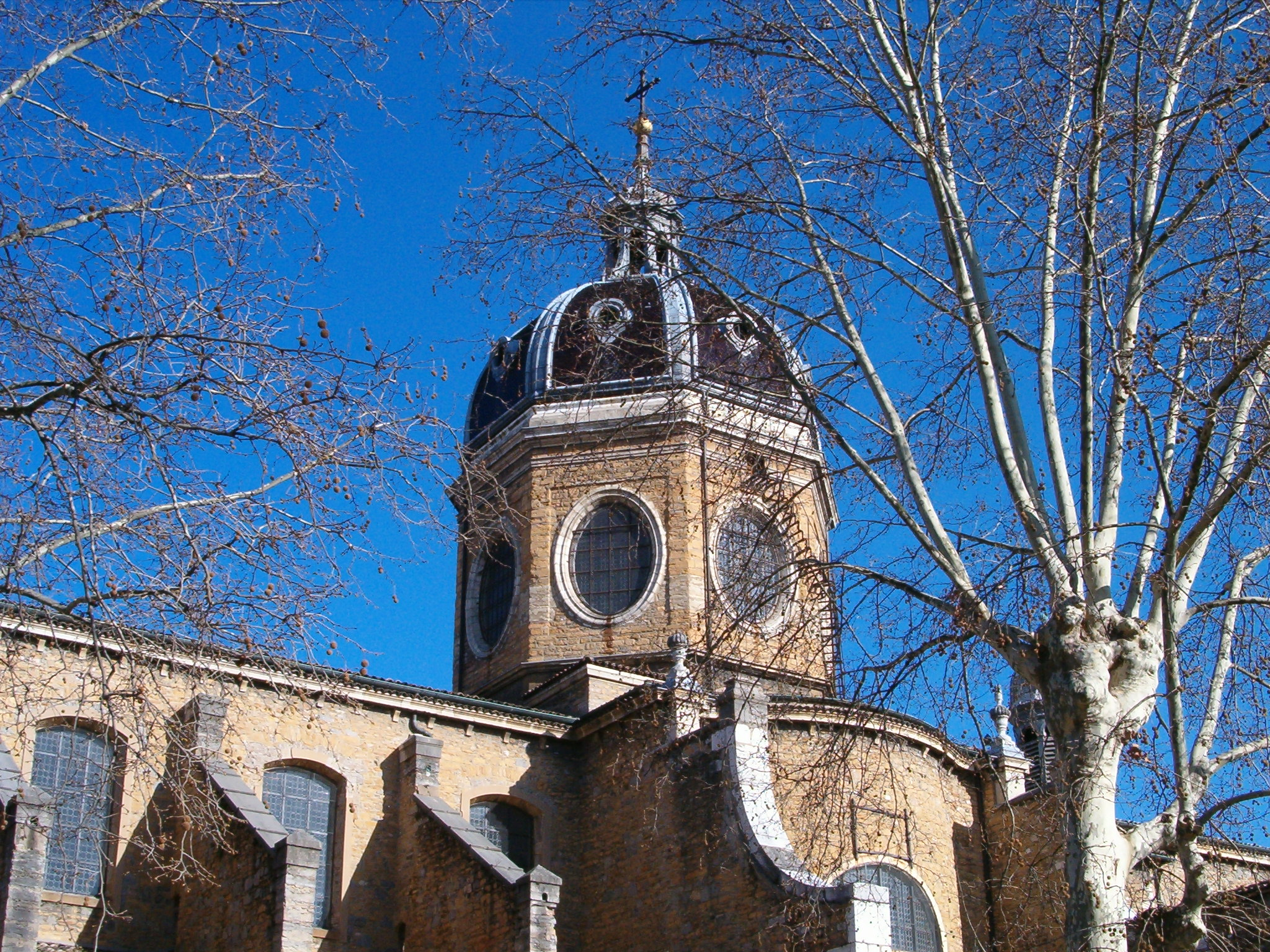 Extérieur de l'Eglise Saint-Bruno des Chartreux de Lyon, France